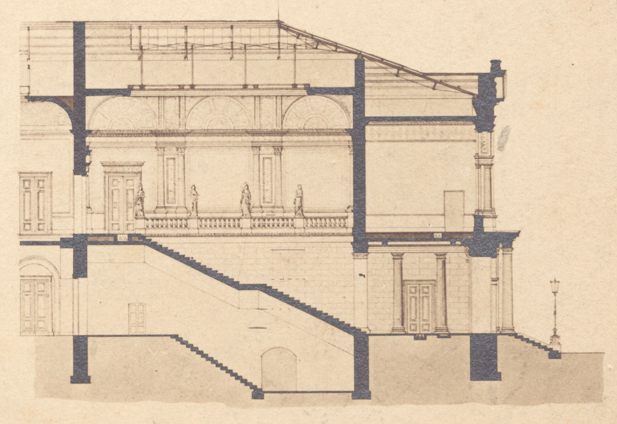 Gemäldegalerie Kassel Schnitt um 1870